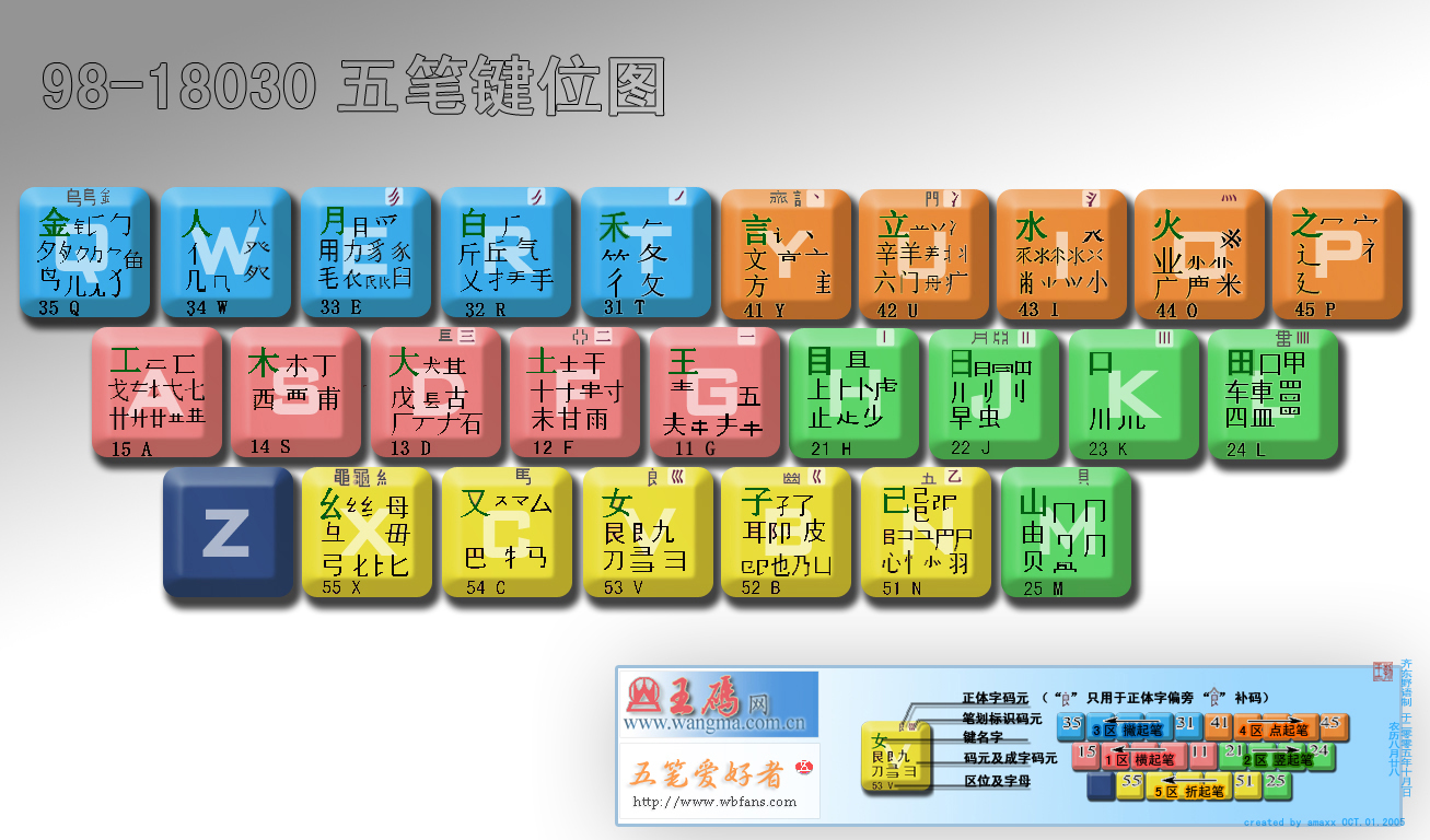 我自己做的五笔示意图。版权没有问题。 2005年6月24日 齐东野语制 25日上传。